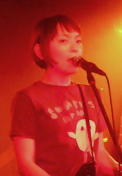 田渕ひさ子（たぶち ひさこ)、2008年 (Hisako Tabuchi, 2008)